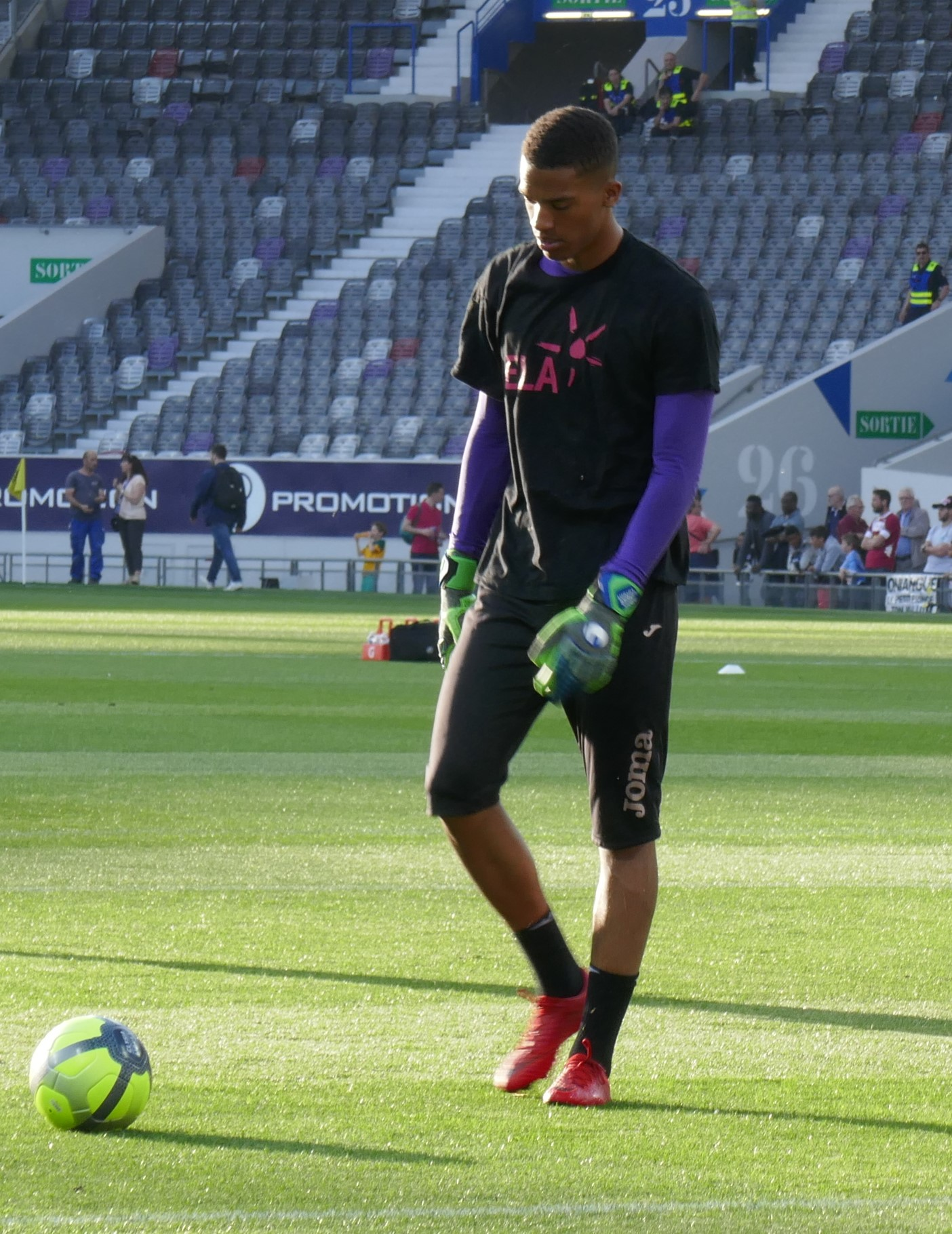 Alban Lafont lors de l'échauffement du match Toulouse FC - Angers SCO comptant pour la 34ème journée de Ligue 1 2017-2018, le 21 avril 2018.